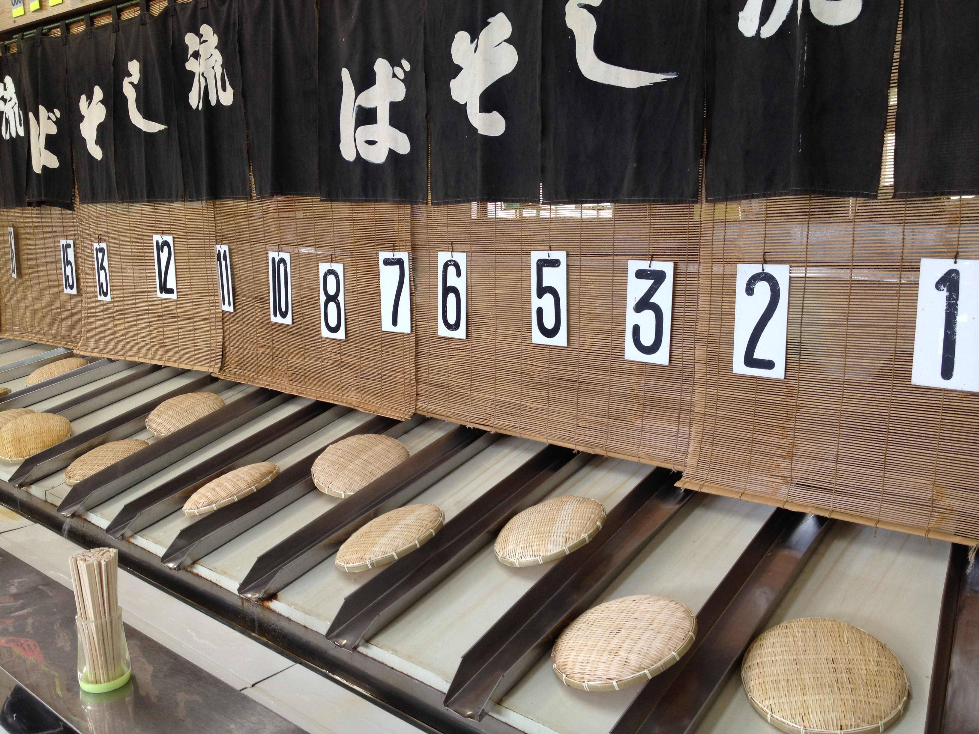 仙人沢売店 (ref) except 4, 9, 14. 忌み数